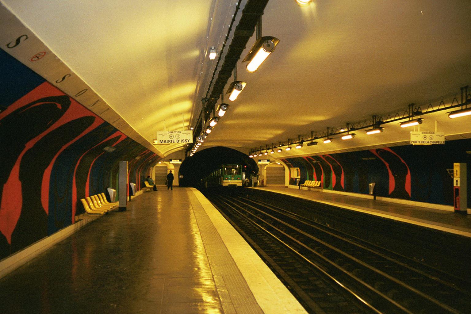 Paris France